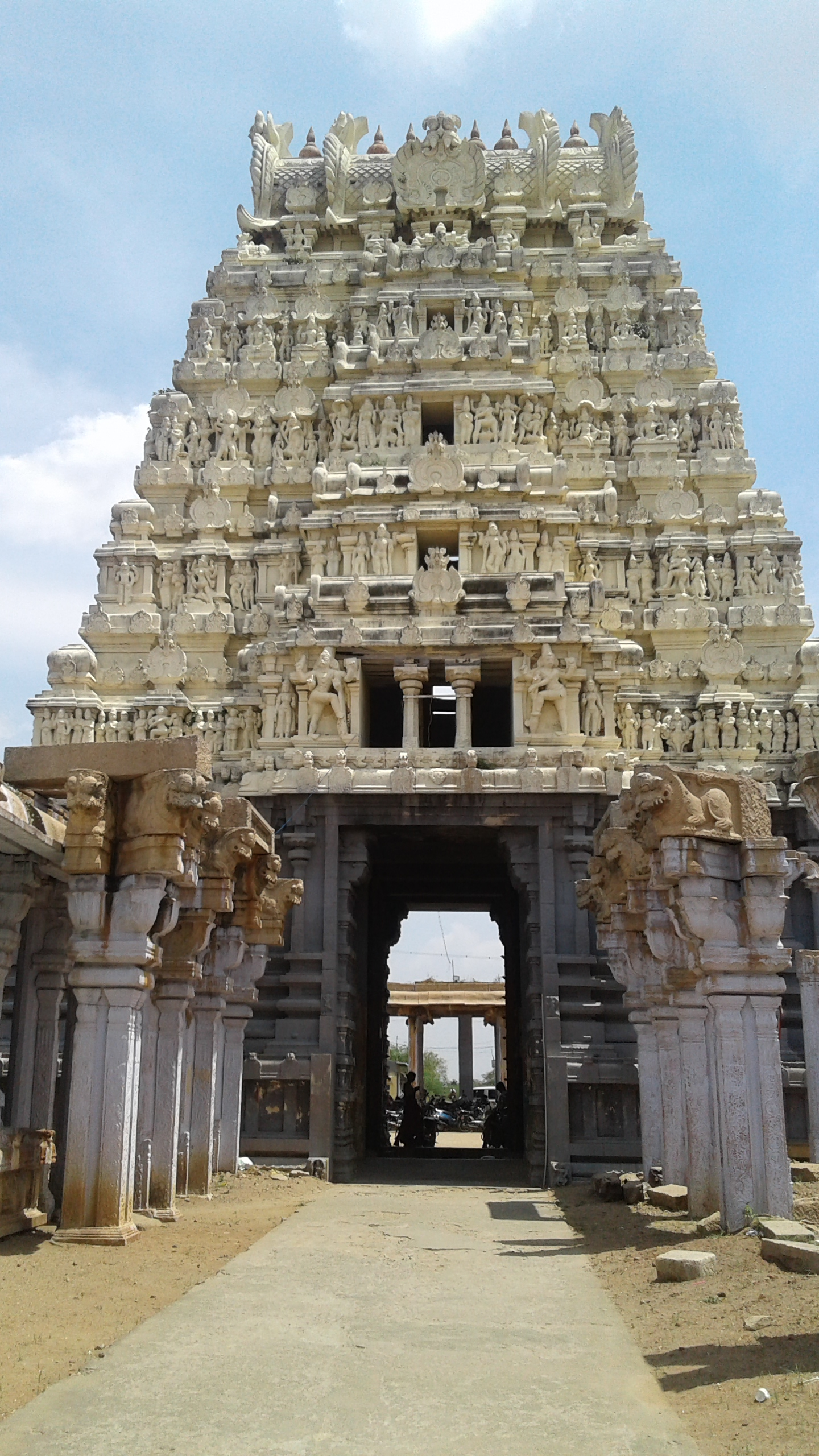 குளித்தலை சிவாயம் கோபுரம்